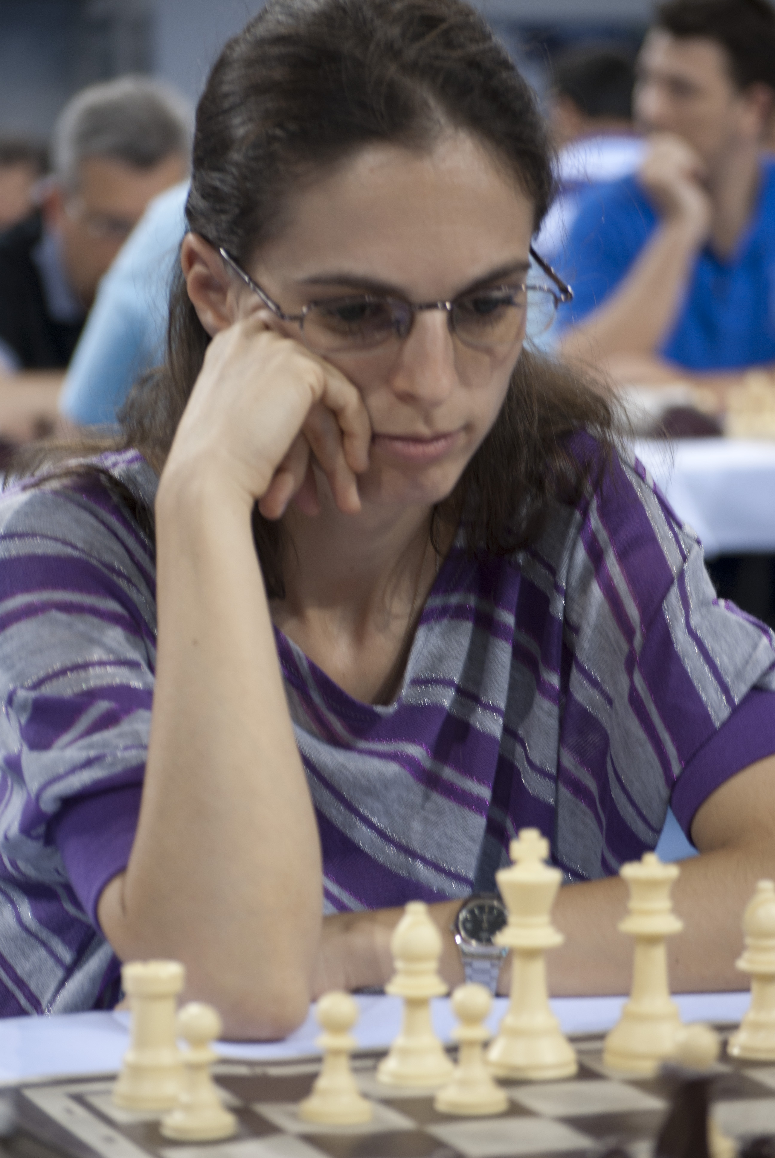 WIM Lyubka Genova